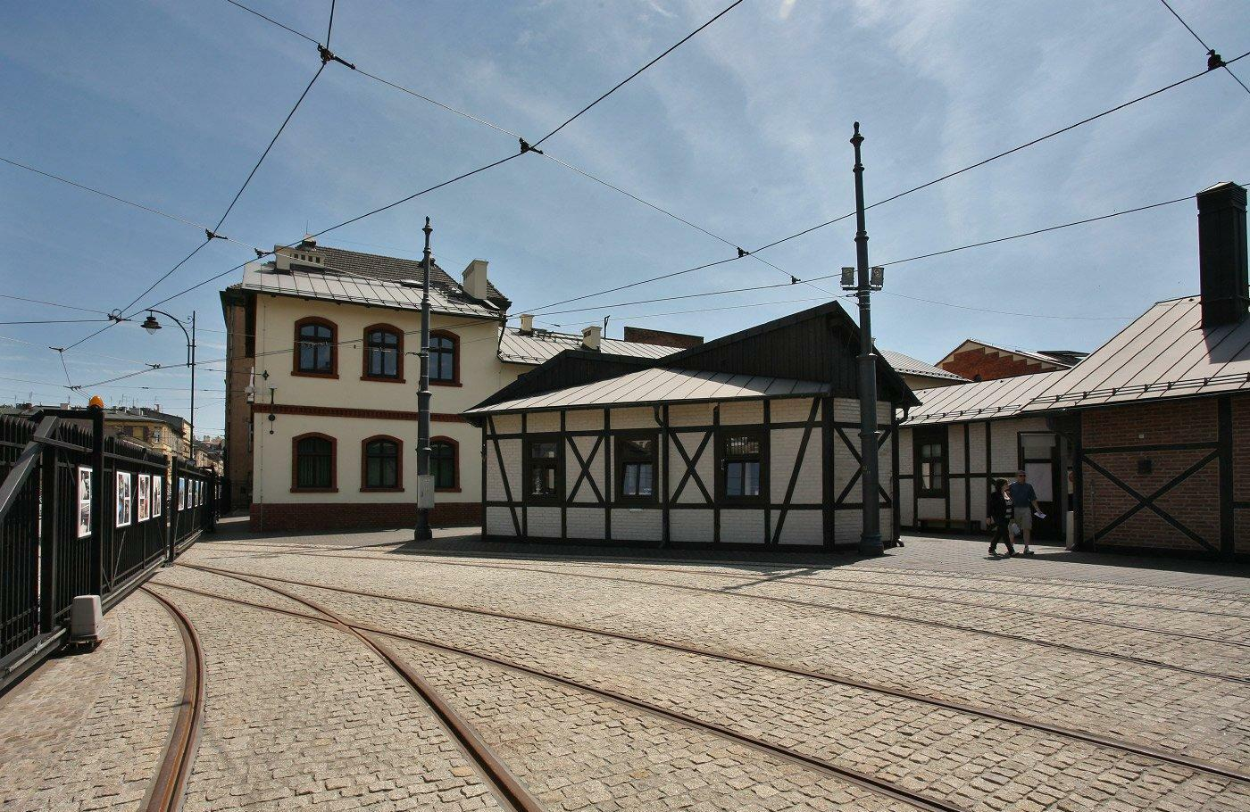 Zabudowania dawnej zajezdni tramwajowej.